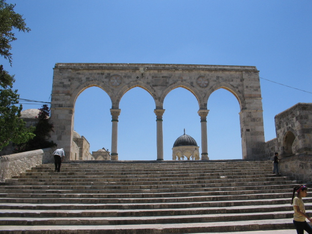 המקשת הצפוני ביותר בצלע המערבית של משטח הר הבית.